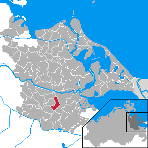 Butzow, Landkreis Ostvorpommern, Mecklenburg-Vorpommern